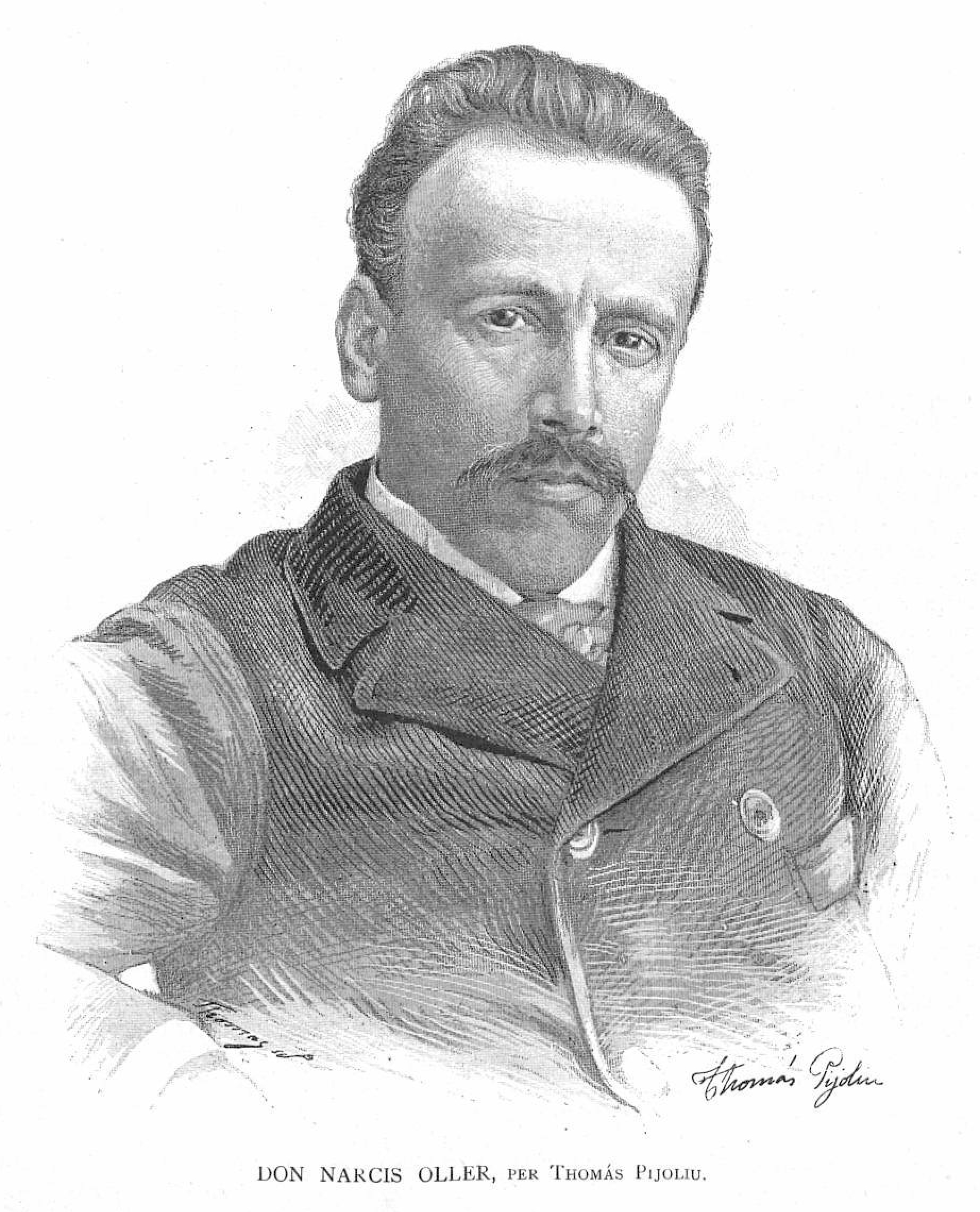 Narcís Oller y Moragas.